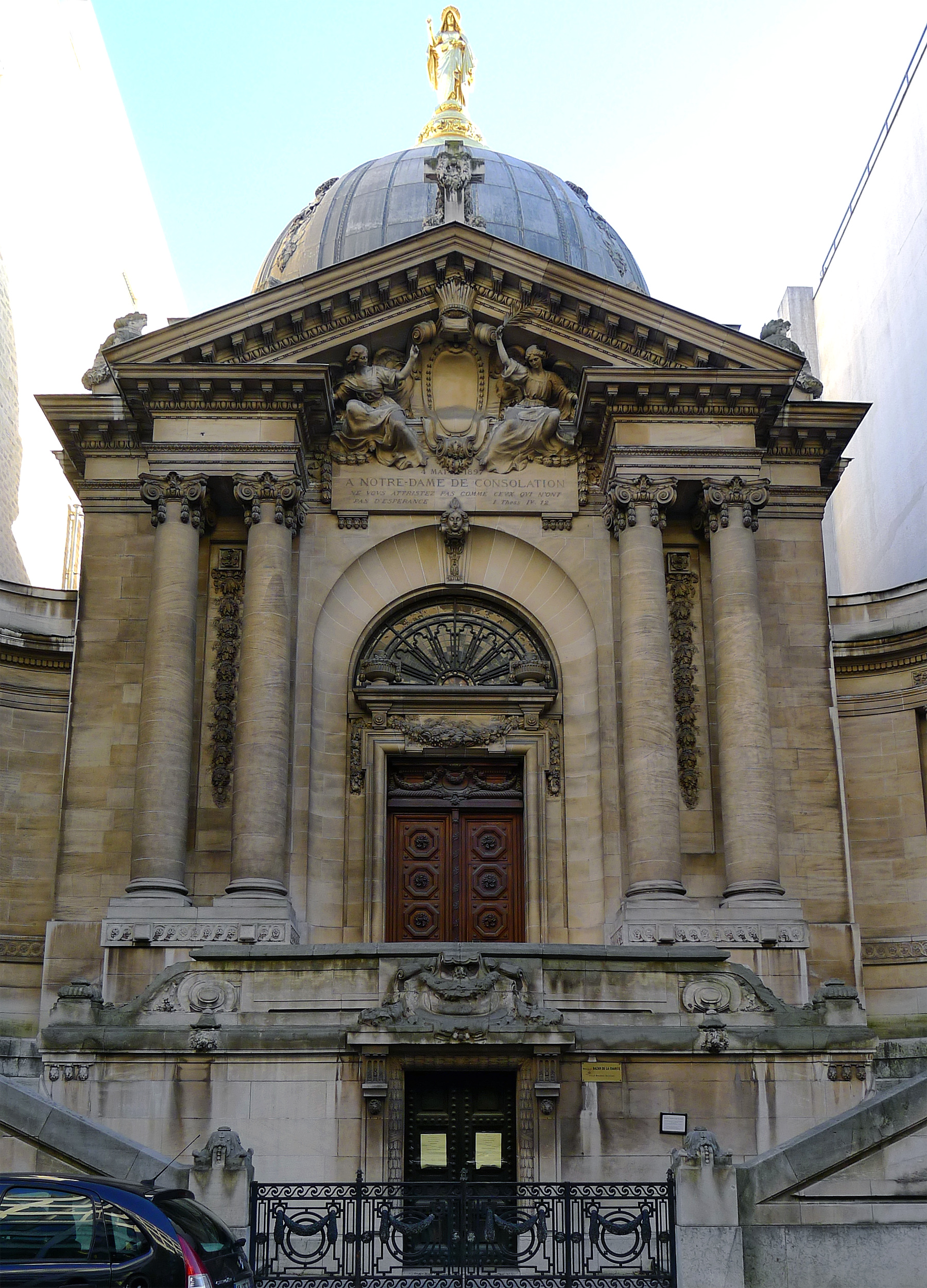 Chapelle Notre-Dame-de-Consolation, rue Jean Goujon - Paris VIII .